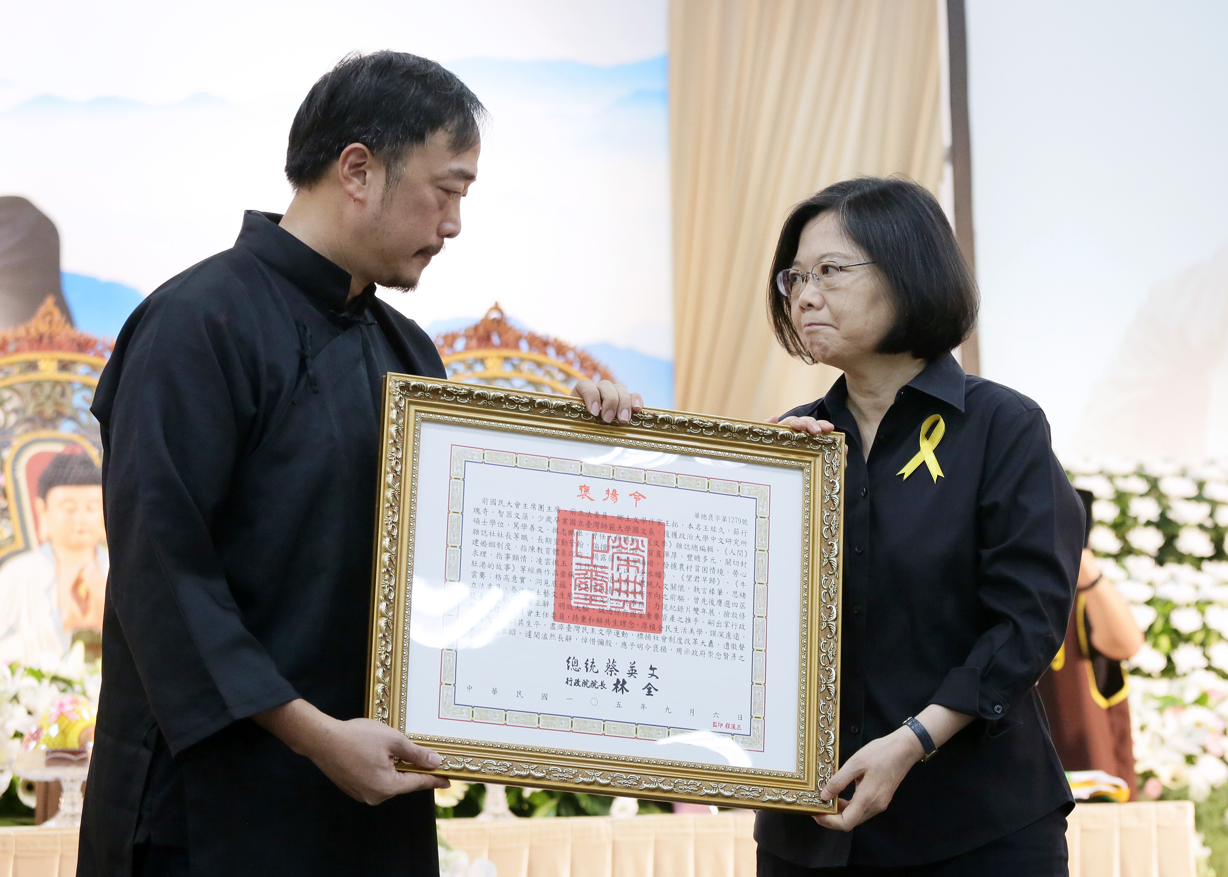 中華民國總統蔡英文（右）出席鄉土文學作家王拓公祭典禮並親自頒發褒揚令，王拓之子王醒之（左）代表王拓家屬接受褒揚令。